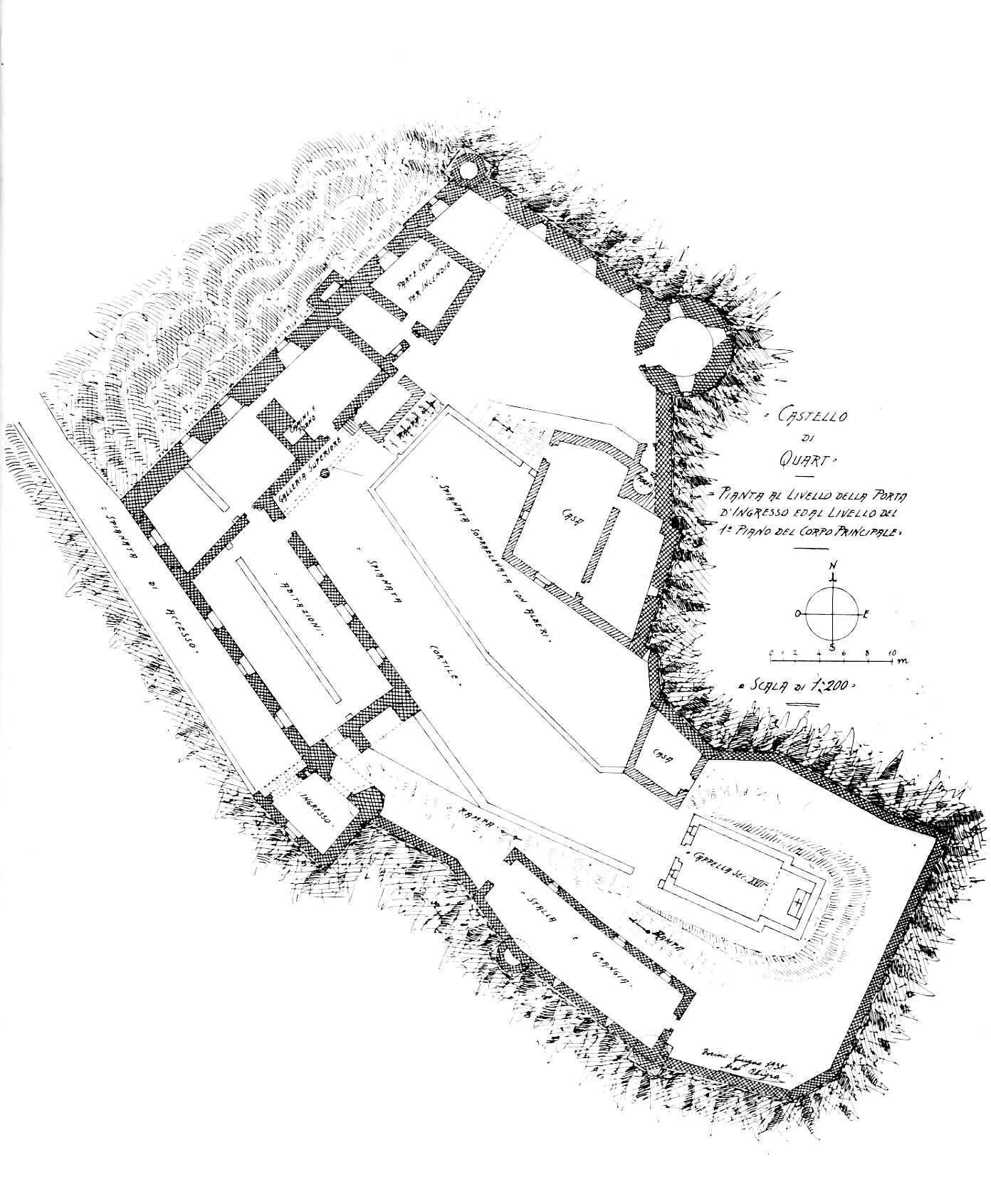 Castello di Quart, Quart, Valle d'Aosta, Italia.